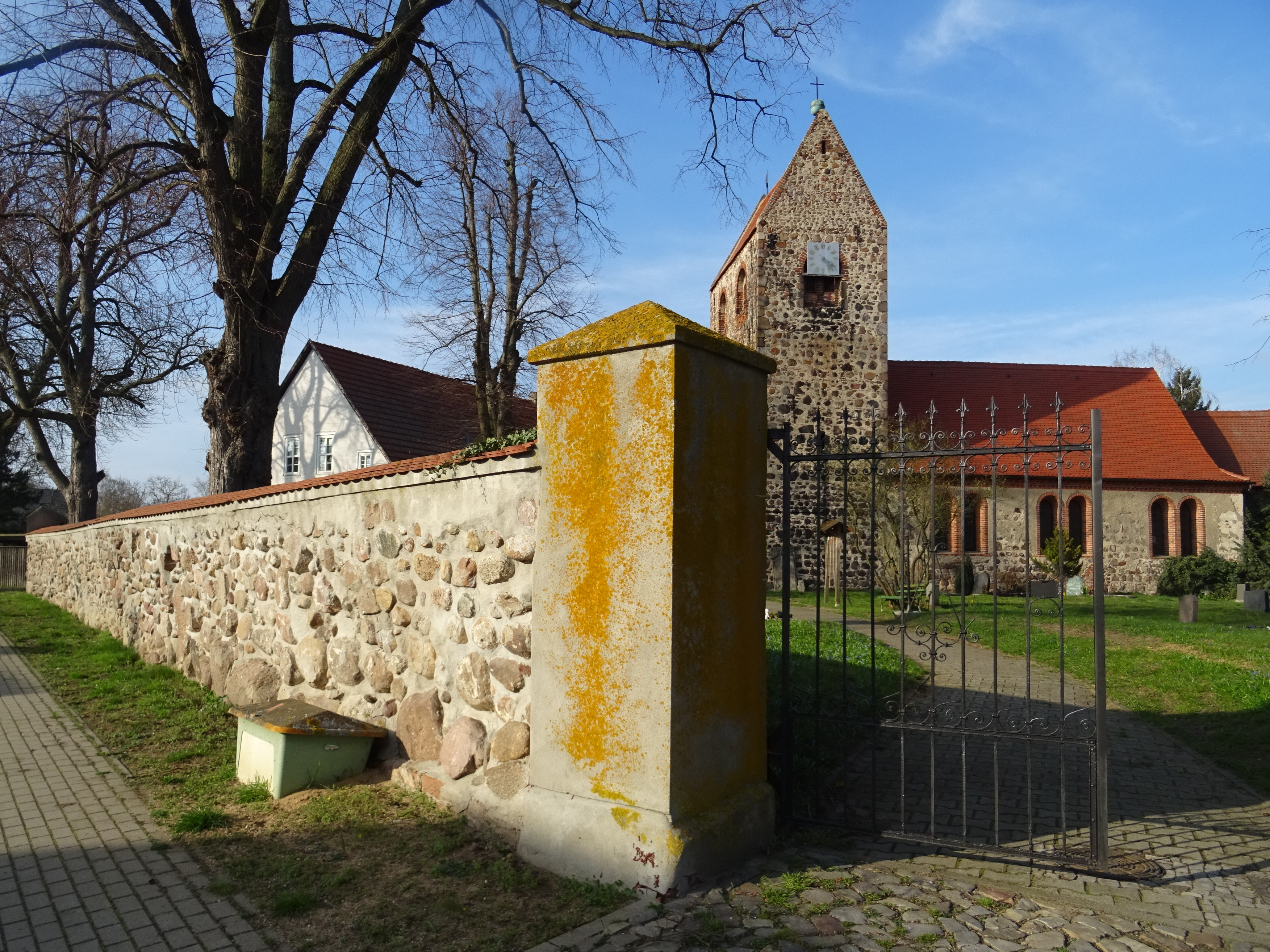 Walsleben, Ortsteil von Osterburg (Altmark), Kirche und Friedhofsmauer